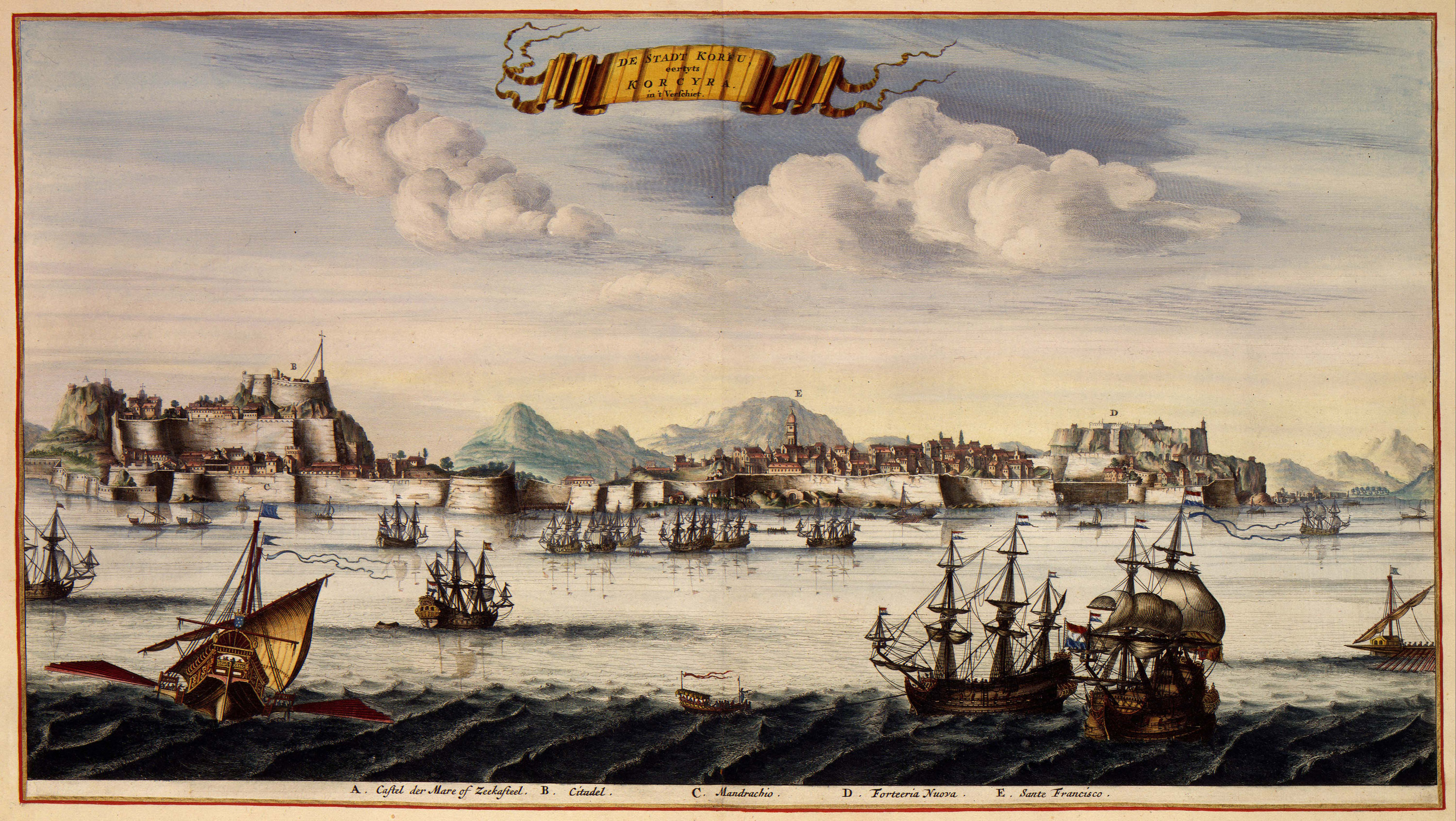 Θέα της Πόλης Κέρκυρας και τα φρούριά της.